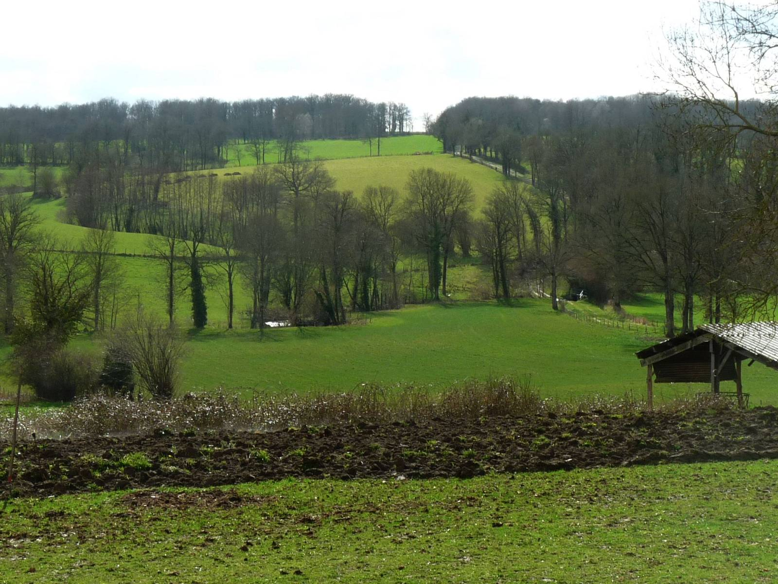 vallée de la Charente, St-Quentin/Charente, France